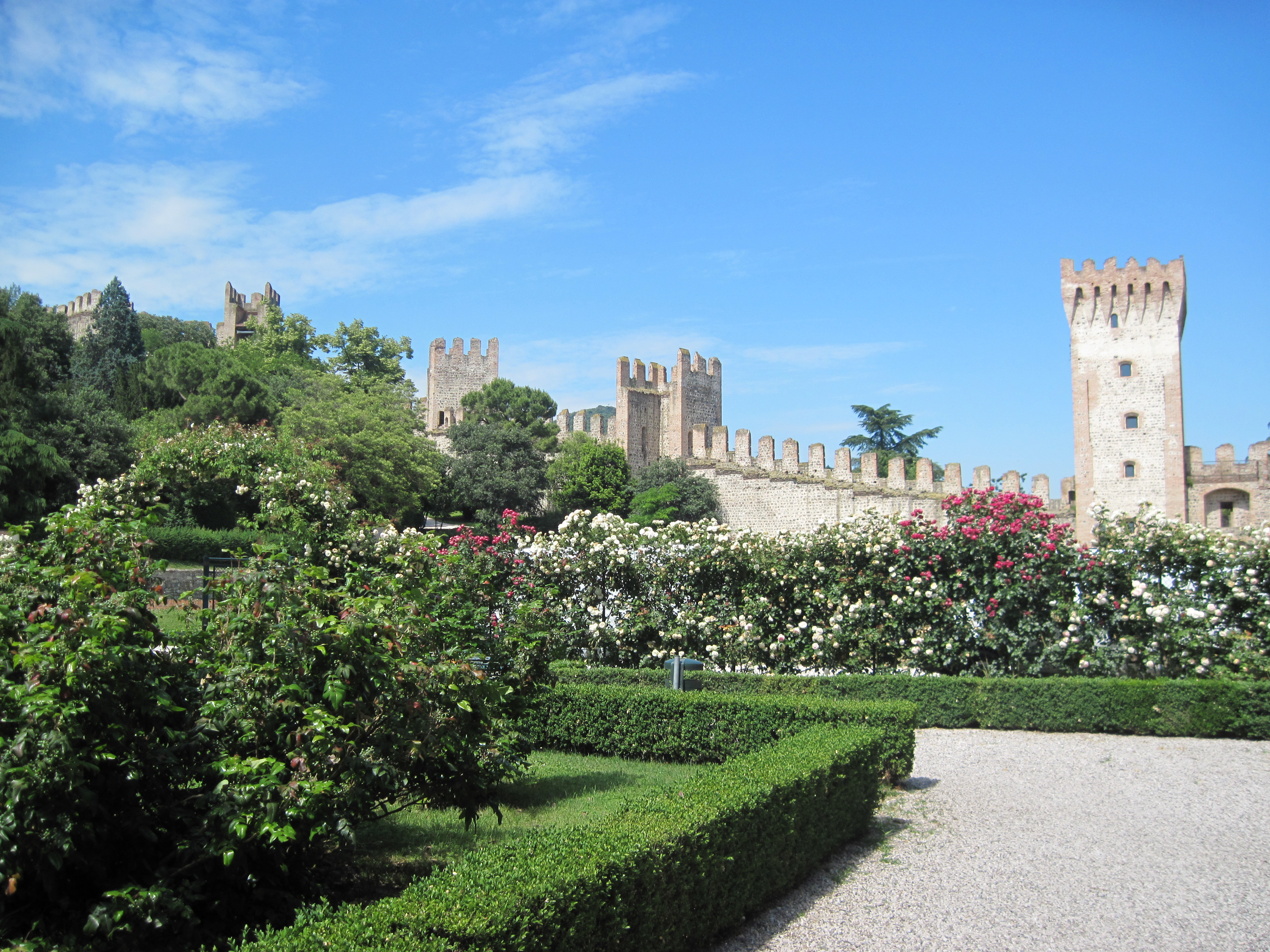 Giardini e Mura di cinta del castello dei Carraresi a Este This is a photo of a monument which is part of cultural heritage of Italy.